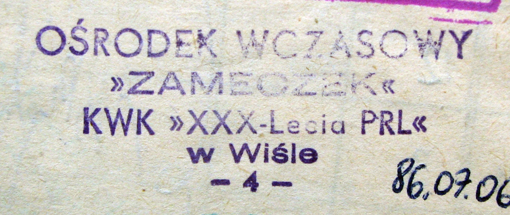 Pieczątka Ośrodka Wczasowego KWK XXX-lecia PRL (ob. KWK Pniówek) "Zameczek" z 1986 r.